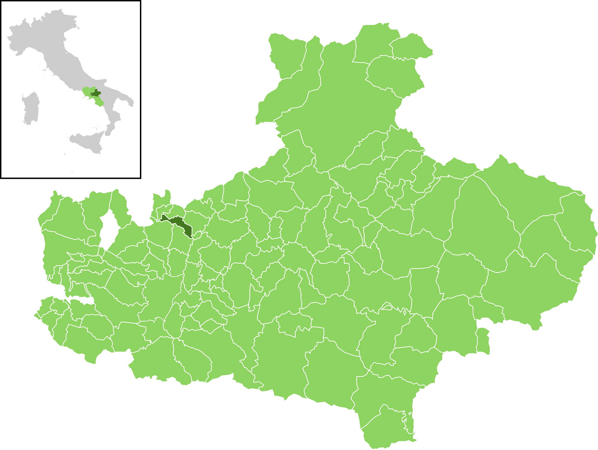 Posizione del comune all'interno della provincia di Avellino